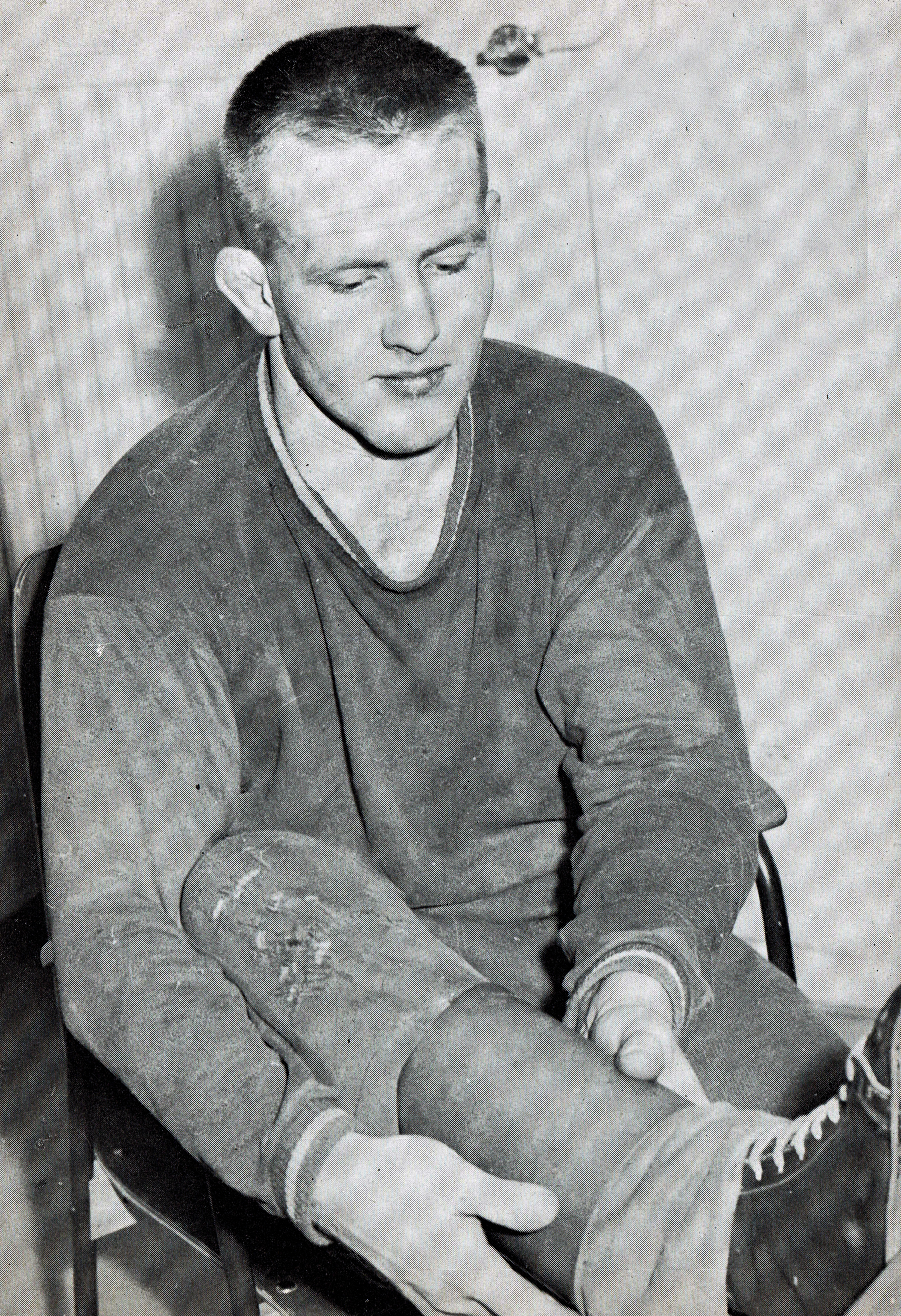 Bertil "Totta" Nyström